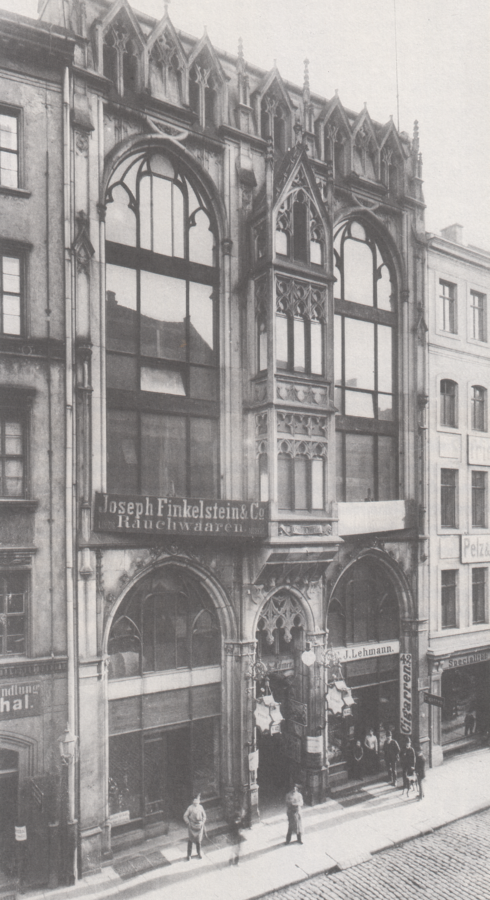 Brühl 42, Leipzig. Geschäftshaus der Pelzhändler Lomer und Joseph Finkelstein & Co. Das Lomer-Haus. Wegen seiner prachtvollen Fassade "Pelzkirche" genannt. Um 1905.